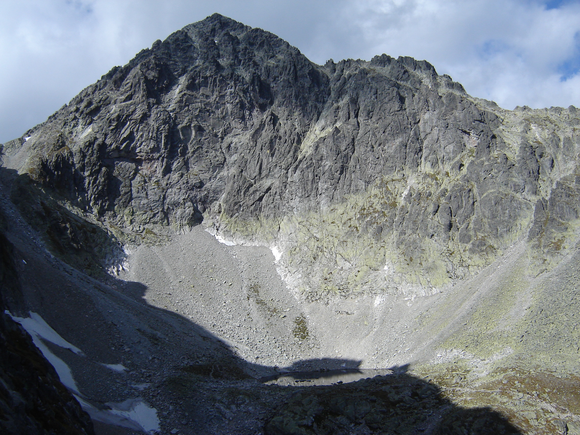 Modré pleso, v pozadí Malý ľadový štít